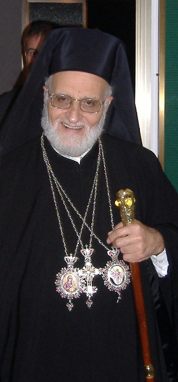 Gragorio III - Patriarca Greco Melkita di Antiochia, Gerusalemme e di tutto l' Oriente